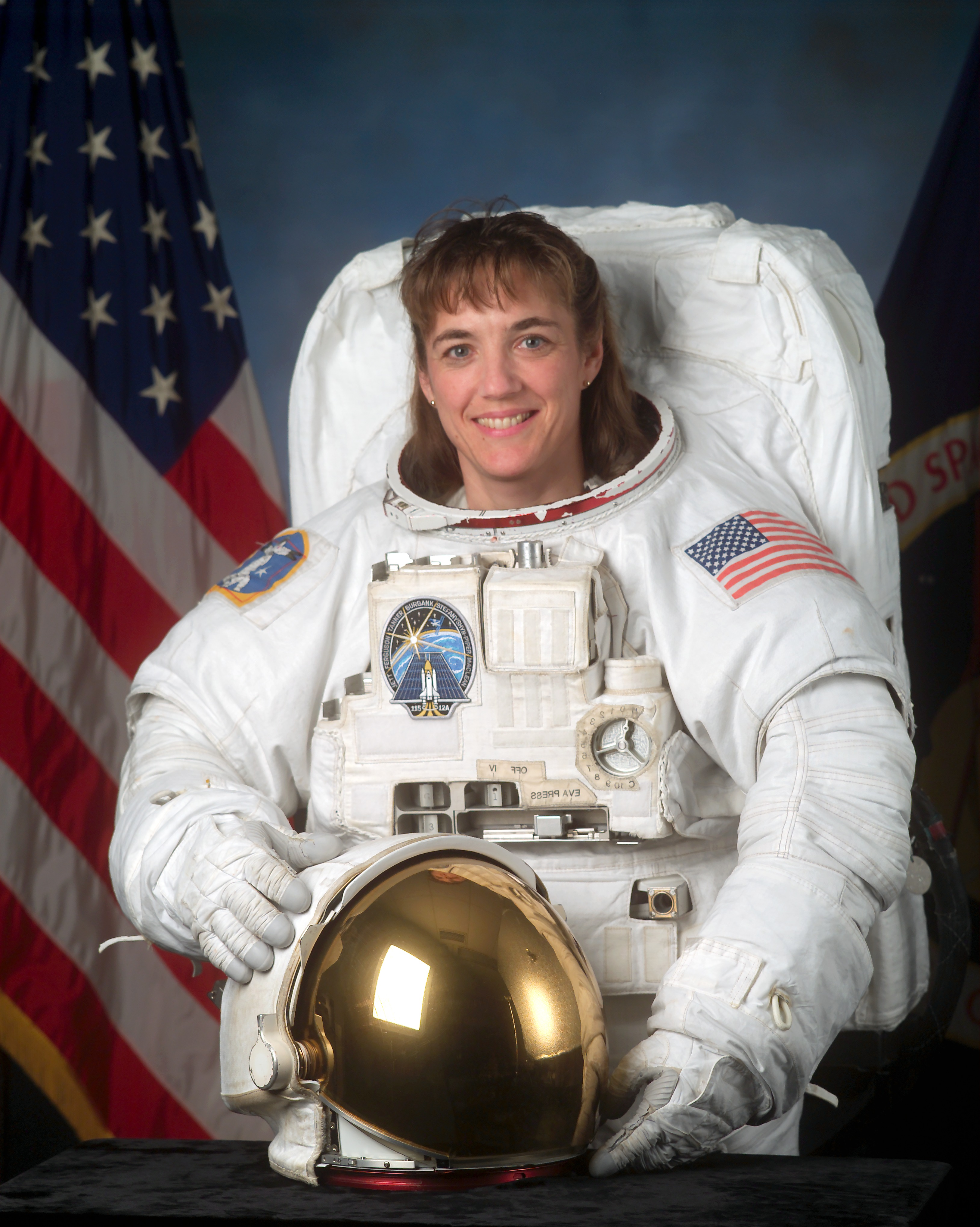 Astronaut Heidemarie Stefanyshyn-Piper